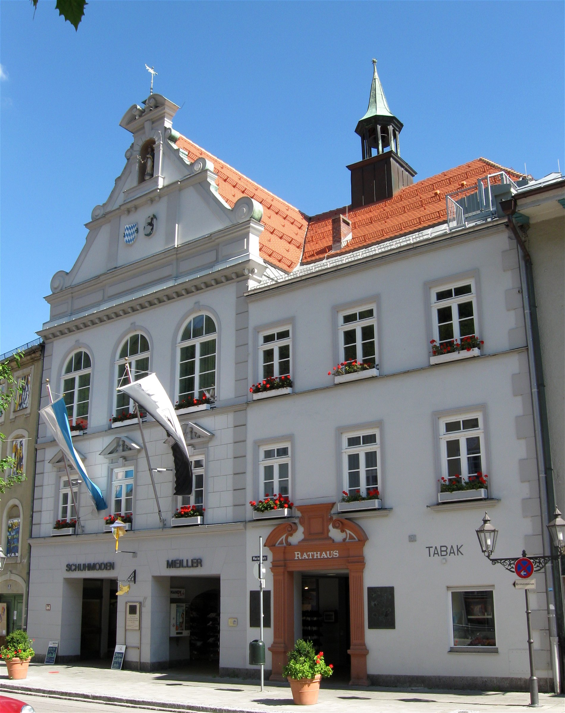 Marienplatz 1; Rathaus, stattlicher Bau mit Neurenaissance-Giebel, errichtet 1890.